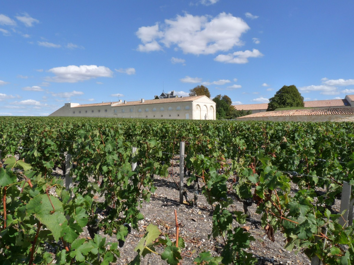 vigne de Mouton-Rotschild, Gironde, France